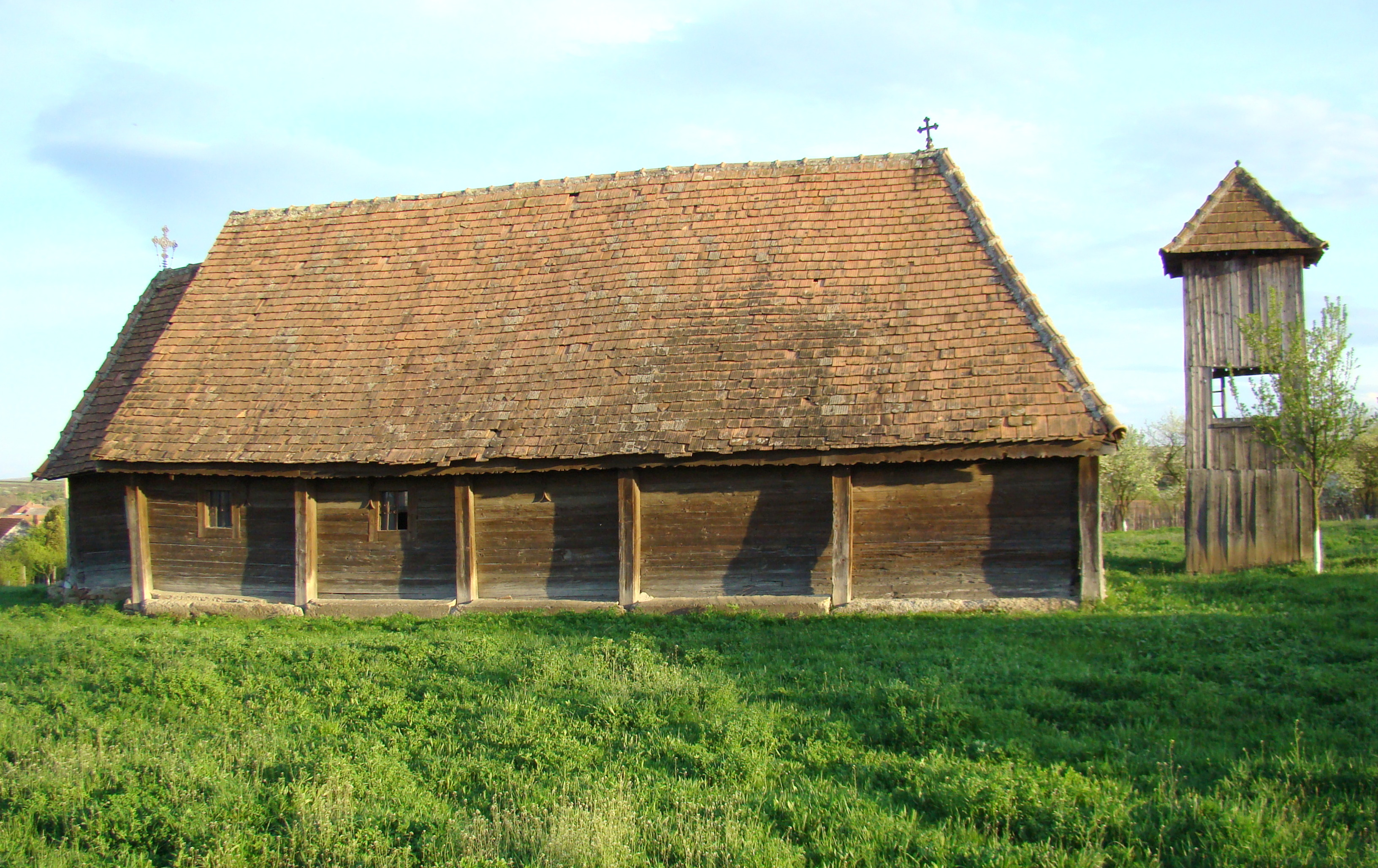 Biserica de lemn din Tău